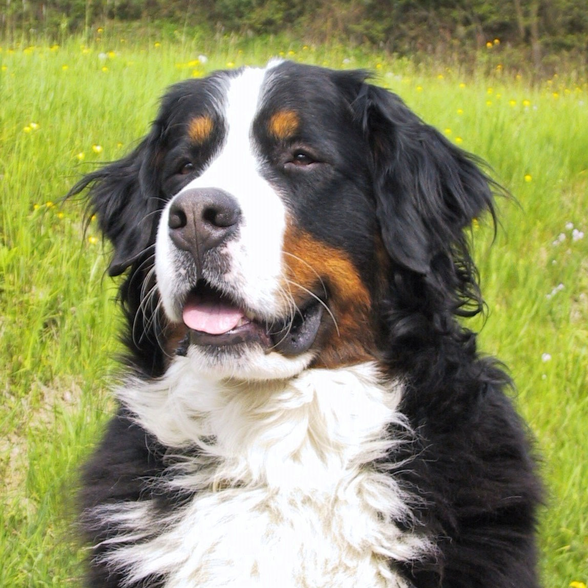 Bernese Mountain Dog